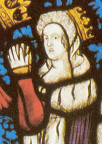 AlžbětaLucemburská